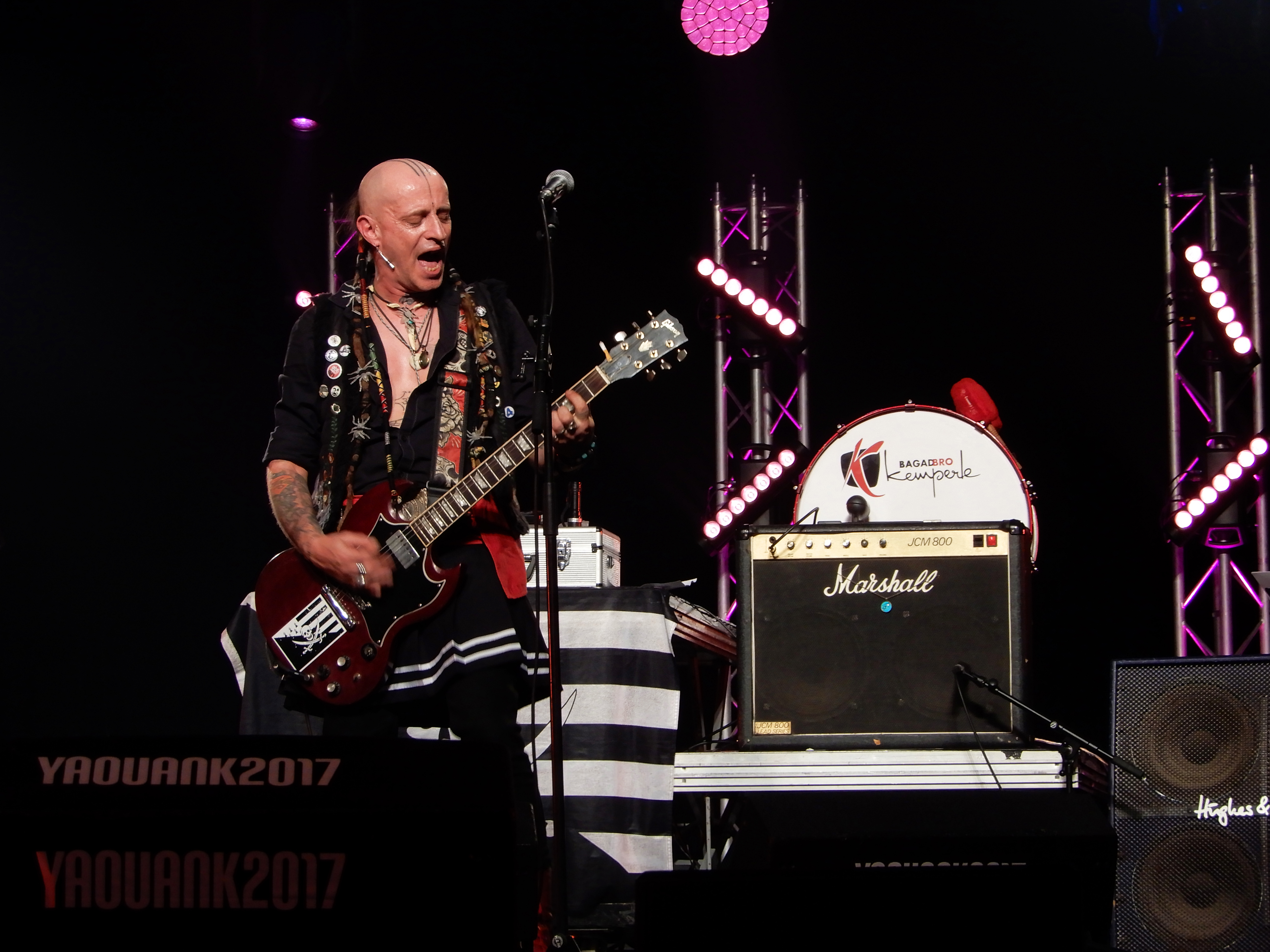 Loran Béru et Les Ramoneurs de Menhirs au Festival Yaouank en 2017.